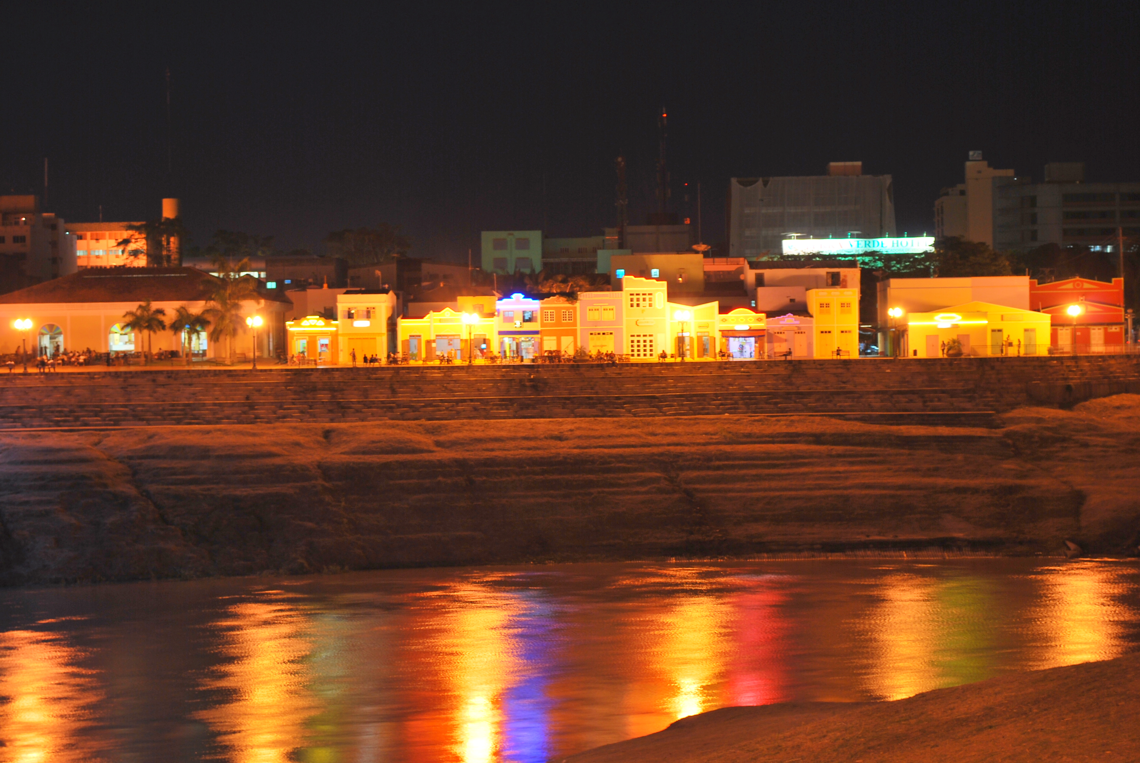 Visão parcial do centro da cidade de Rio Branco, capital do estado do Acre, Brasil.